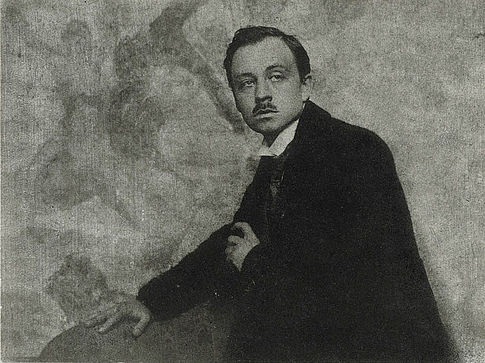 Portrait of German painter Josef Hegenbarth by Hugo Erfurth. Schwarzer Öldruck, 171 x 227 mm, Japanpapier 433 x 315 mm, hellgrauer Untersatzkarton 452 x 339 mm